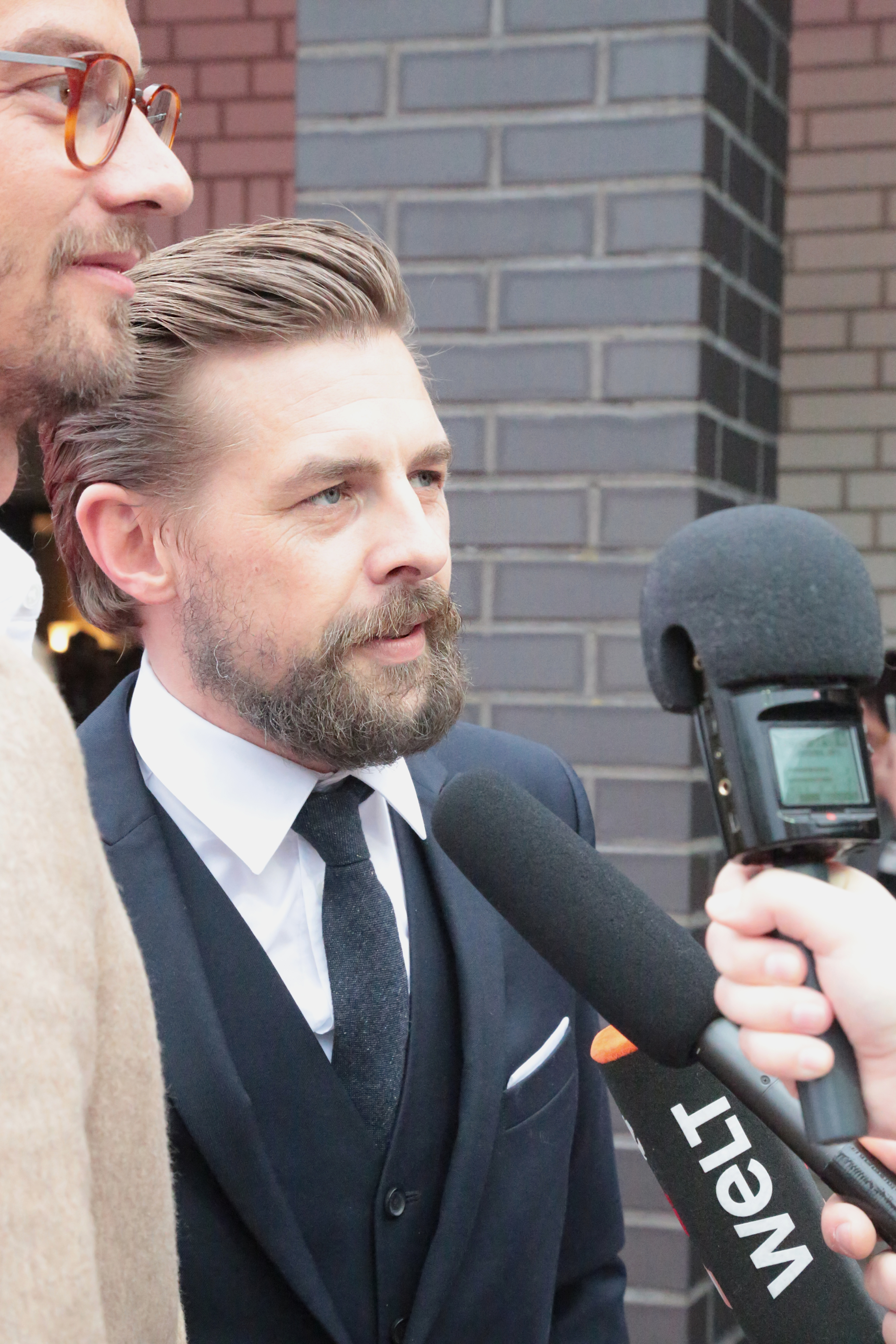 Joko Winterscheidt, Klaas Heufer-Umlauf beim Grimme-Preis 2018, am 13.04.2018 in Marl.